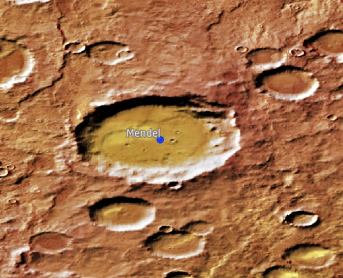 Cráter marciano Mendel. (Imagen IAU/USGS/Goddard/A SU/USGS)